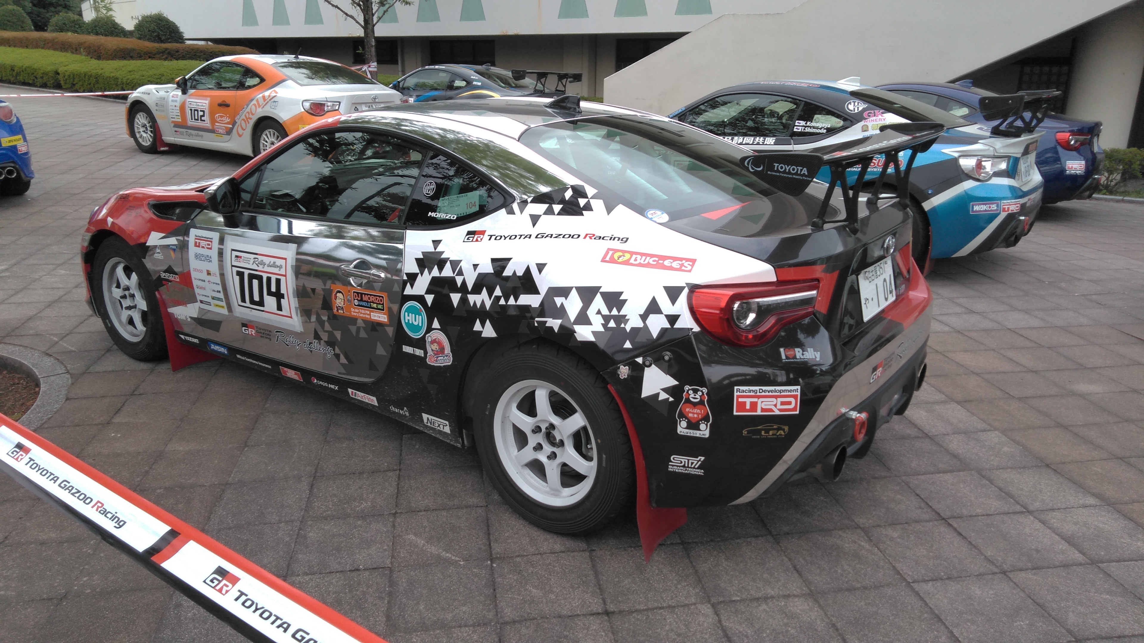 豊田章男が2019年TGRラリーチャレンジ富士山すそのでドライブしたトヨタ・86